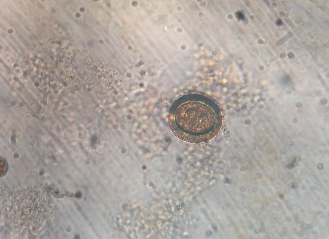 Okruglo jaje svinjske trakavice (Taenia solium) s karakterističnom širokom, ispruganom opnom. Preparat stolice obrađen MIFC metodom.